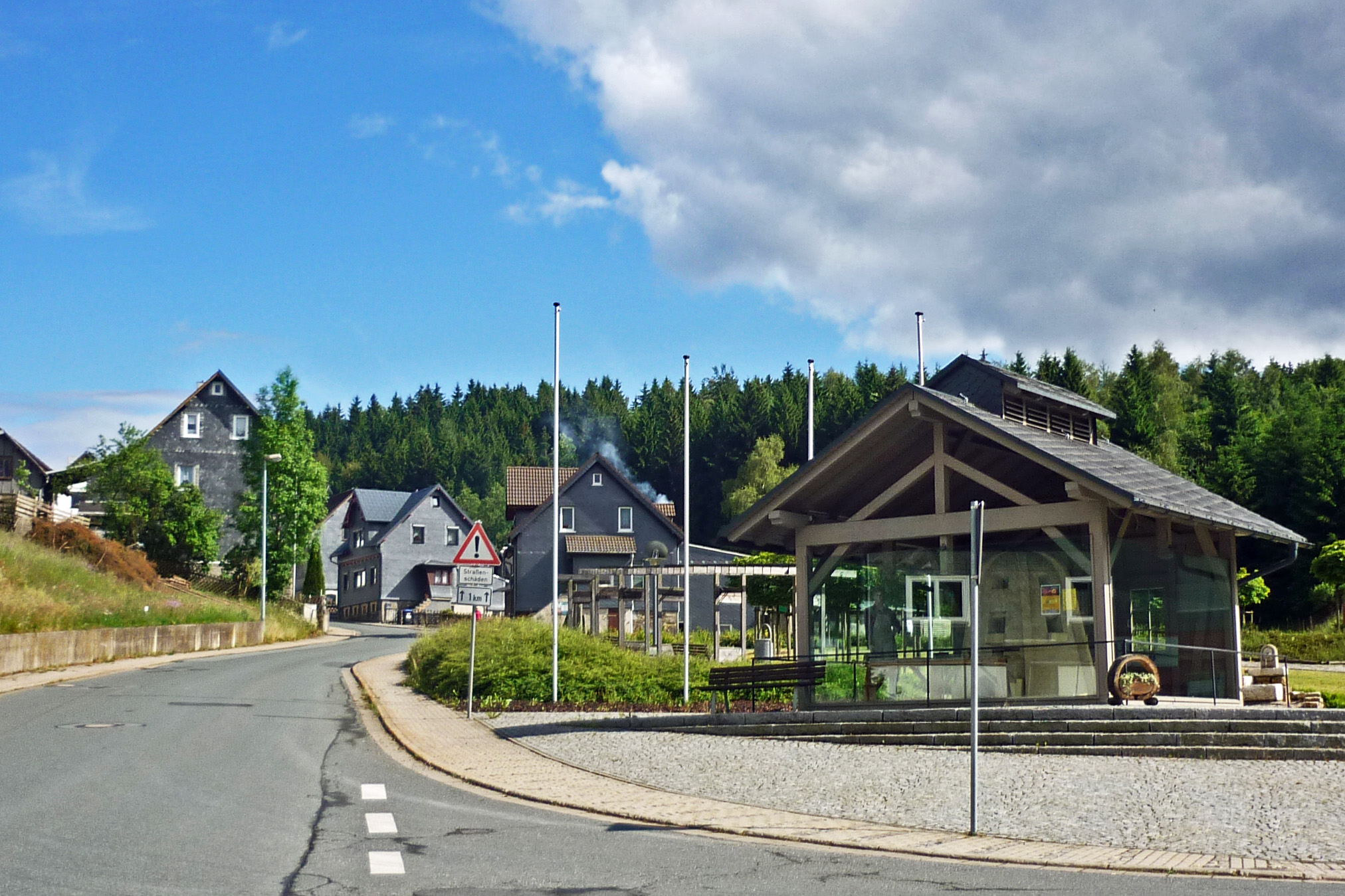 Ortsteil Piesau-Bärenbach mit Modell eines Glasschmelzofens, ehem. Standort der Unteren Hütte Piesau